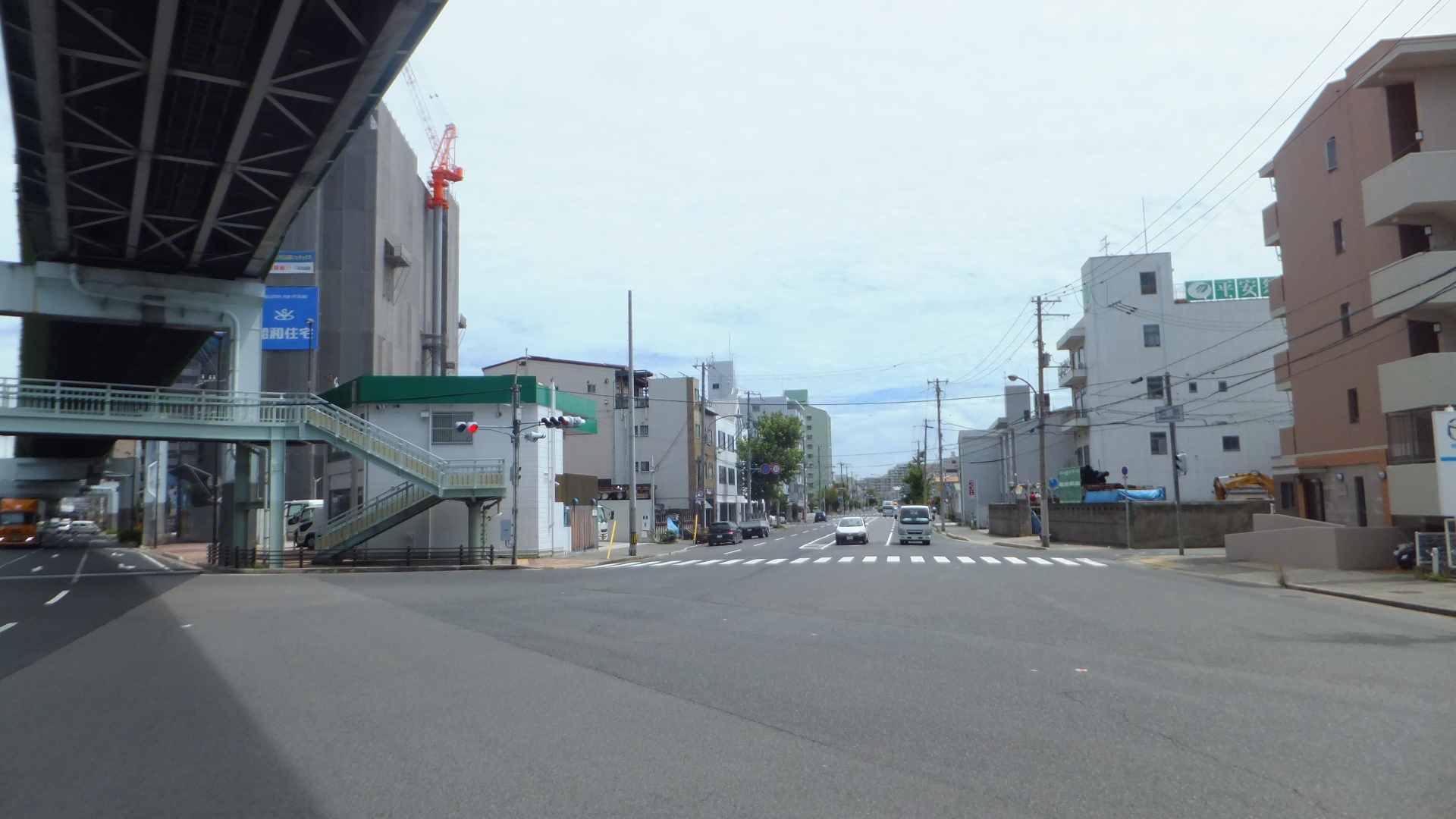 兵庫県神戸市松原通5丁目 兵庫県道489号兵庫埠頭線